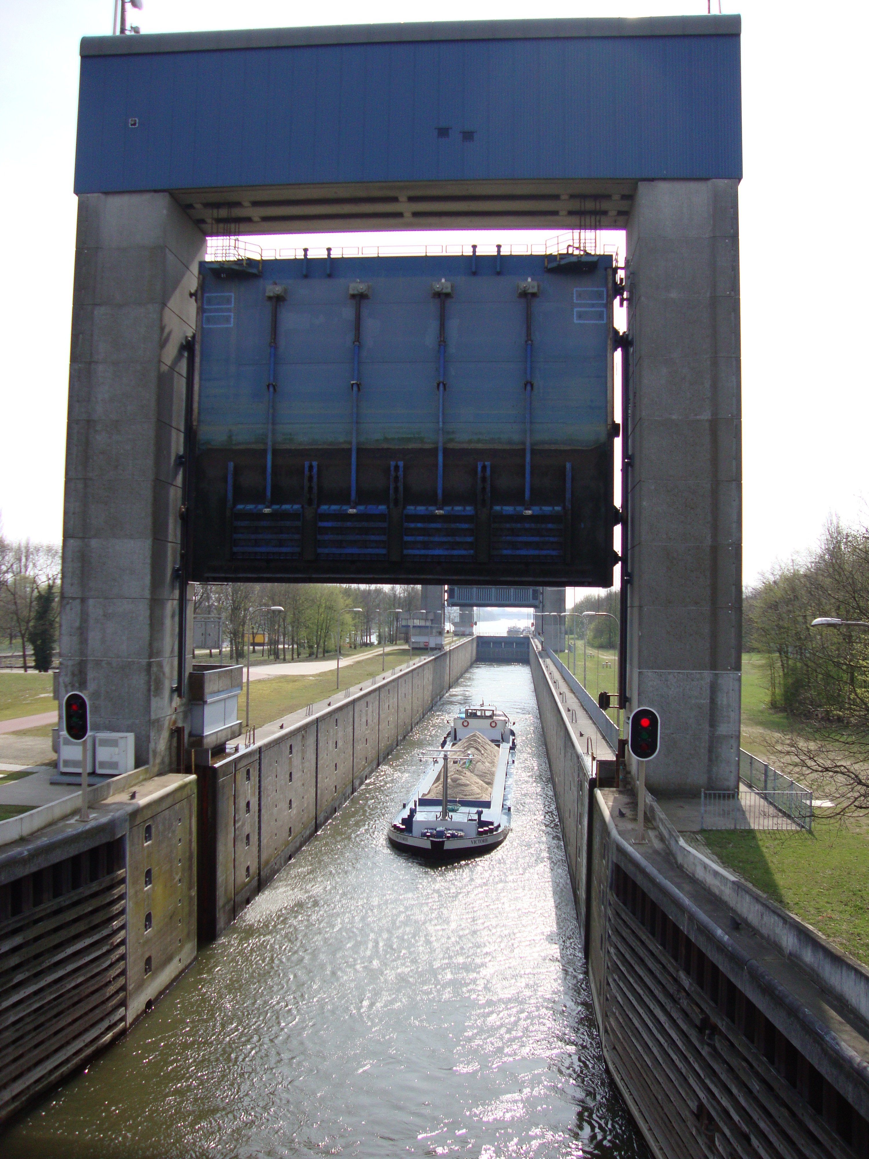 Nijmegen,_sluiscomplex_Weurt,_nieuwe_sluis,_noordzijde_open.